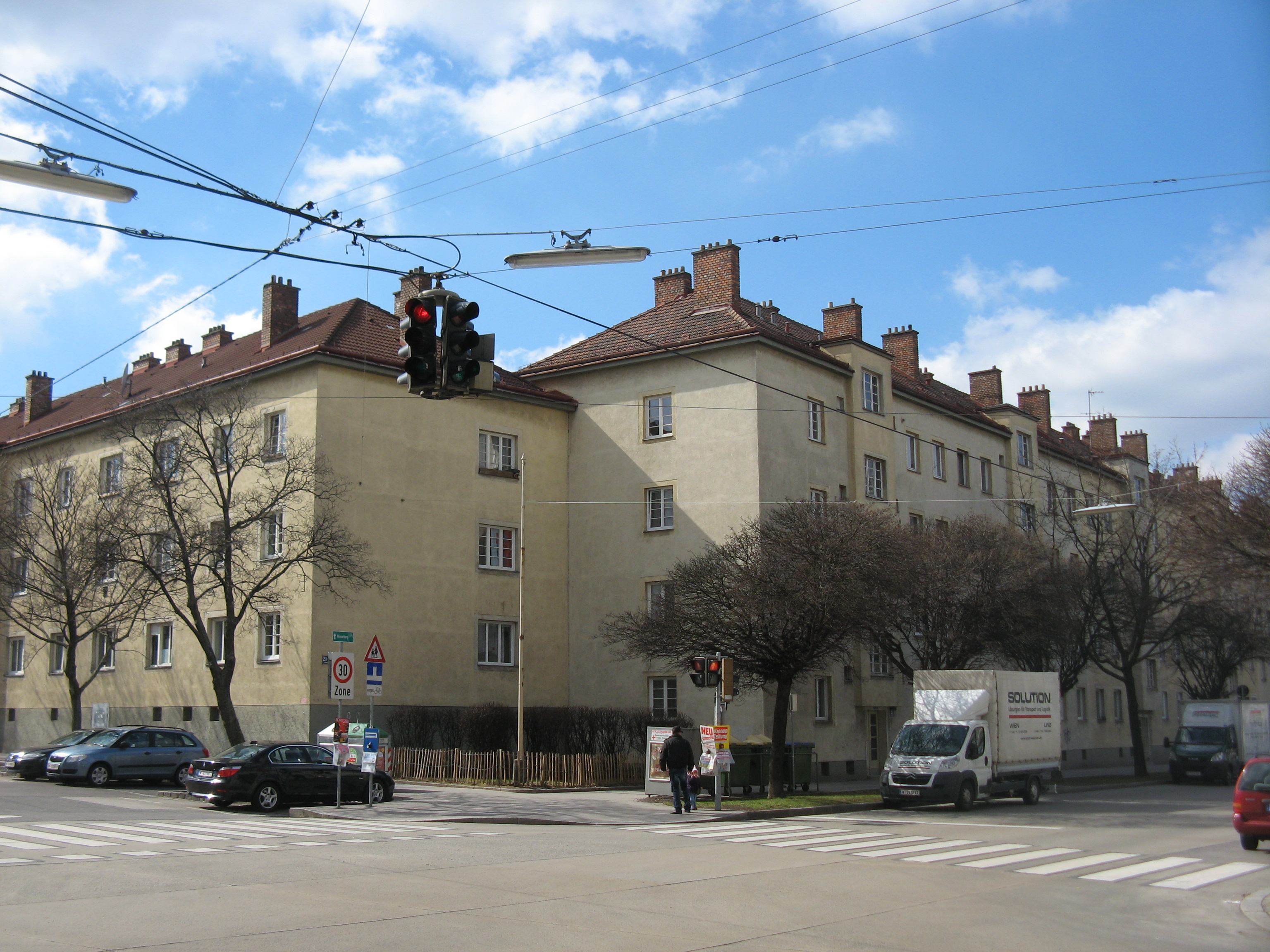 Städtische Wohnhausanlage (1939-1942) von Walter Pind, Troststraße 21-37, Wien-Favoriten